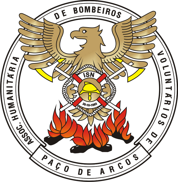 Emblema da Associação Humanitária de Bombeiros Voluntários de Paço de Arcos